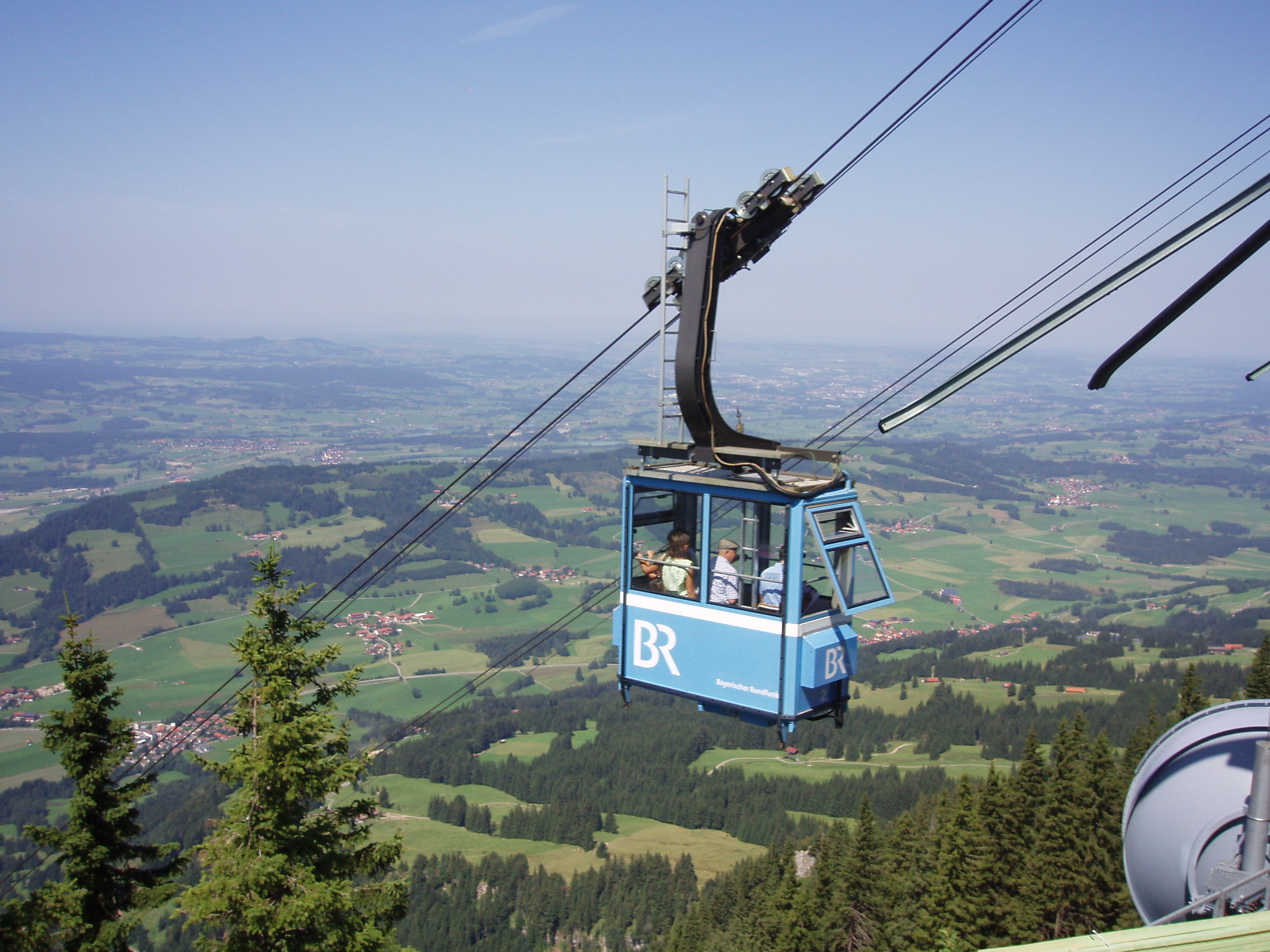 Kabine der Grüntenseilbahn kurz vor der Bergstation